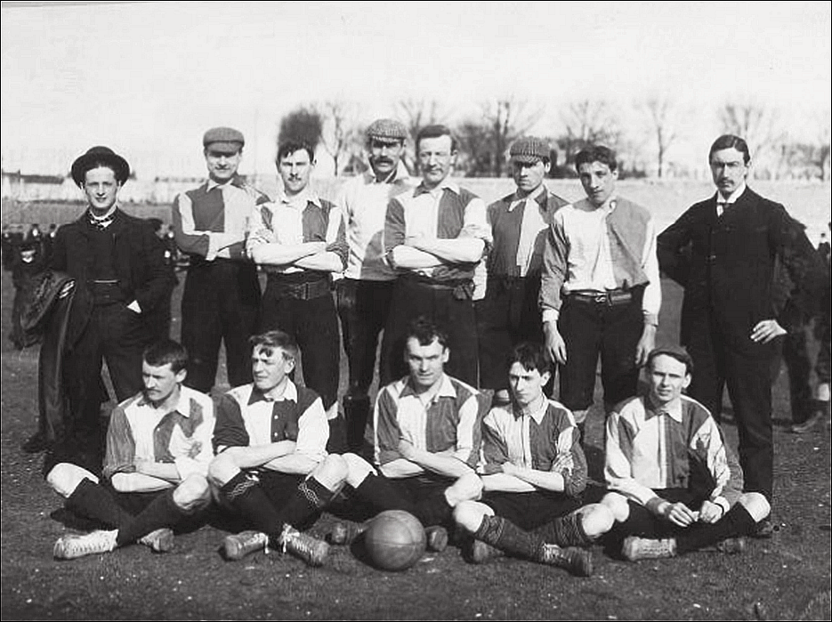 16 mars 1902 à Levallois-Perret, finale de la Coupe Dewar entre le Standard Athletic Club et l'United Sports Club - équipe de l'United SC